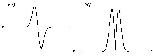 Временное и спектральное представления WAVE-вейвлета